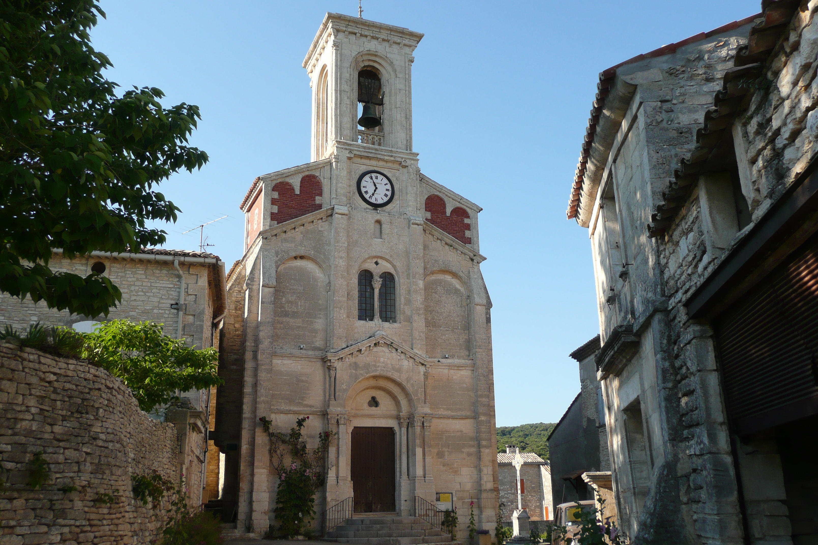 Eglise à Le Garn.